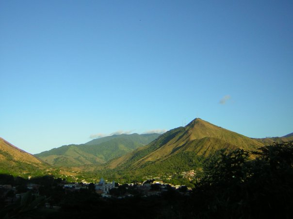 vista del pueblo de san casimiro desde los mangos